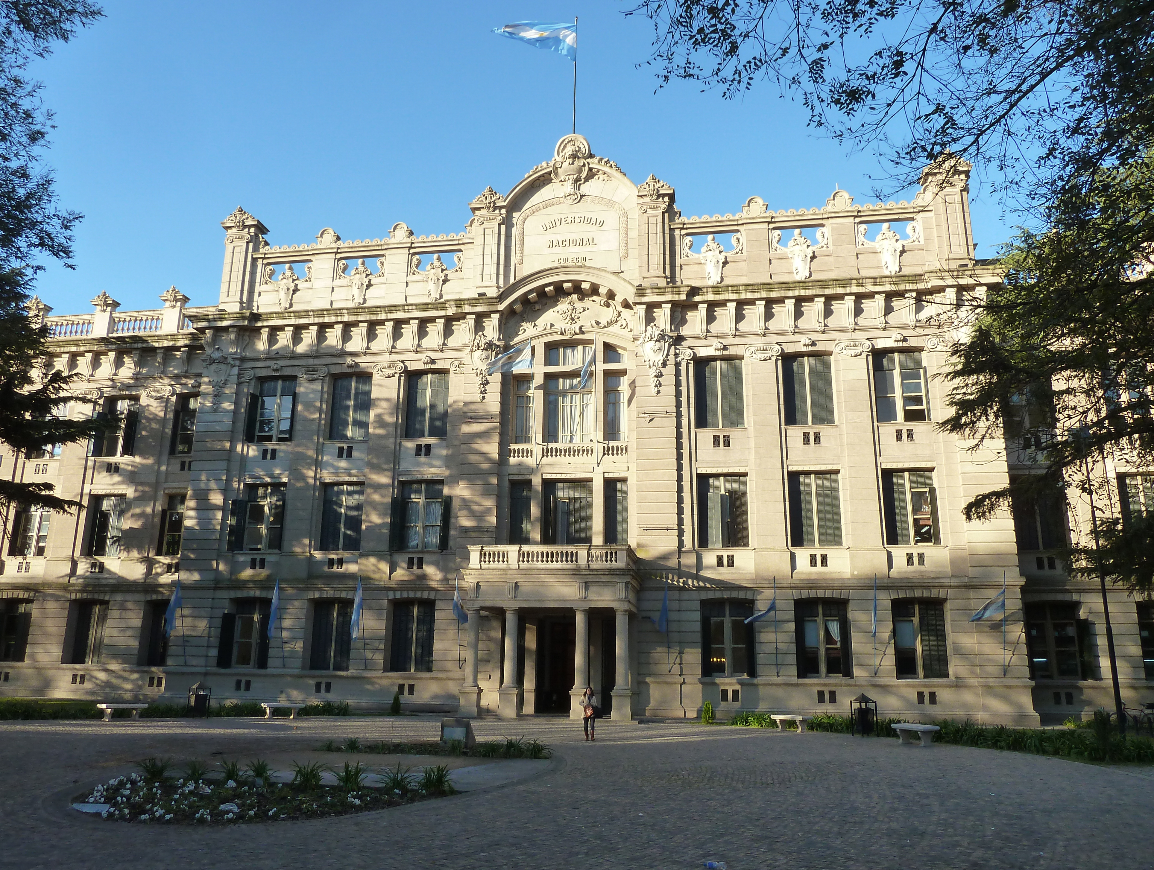 Fachada del Colegio Nacional Rafael Hernández de La Plata